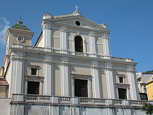 In onore di San Nicola di Mira, santo patrono di Lungro, la cattedrale è la principale chiesa del borgo nonché la cattedrale dell'Eparchia di Lungro